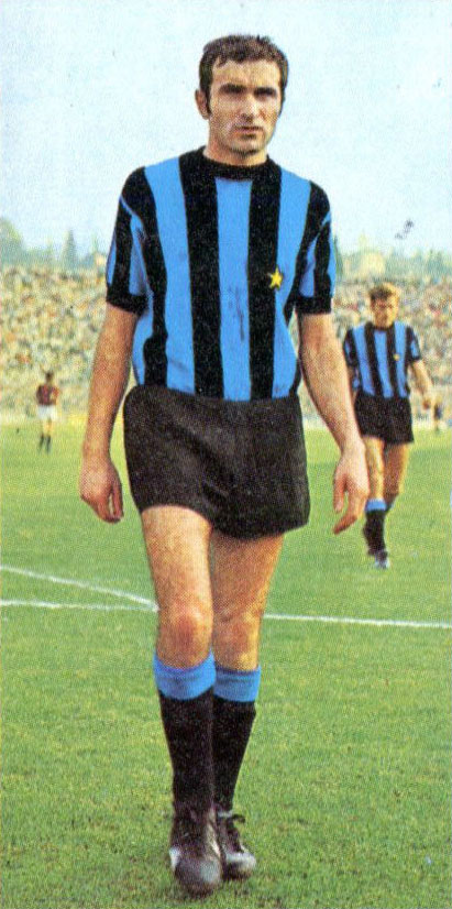 Bologna, stadio Comunale, 11 ottobre 1970. Il difensore dell'Inter, Mario Giubertoni, in occasione della trasferta sul campo del Bologna (2-2) valevole per la 3ª giornata del campionato italiano di Serie A 1970-71.